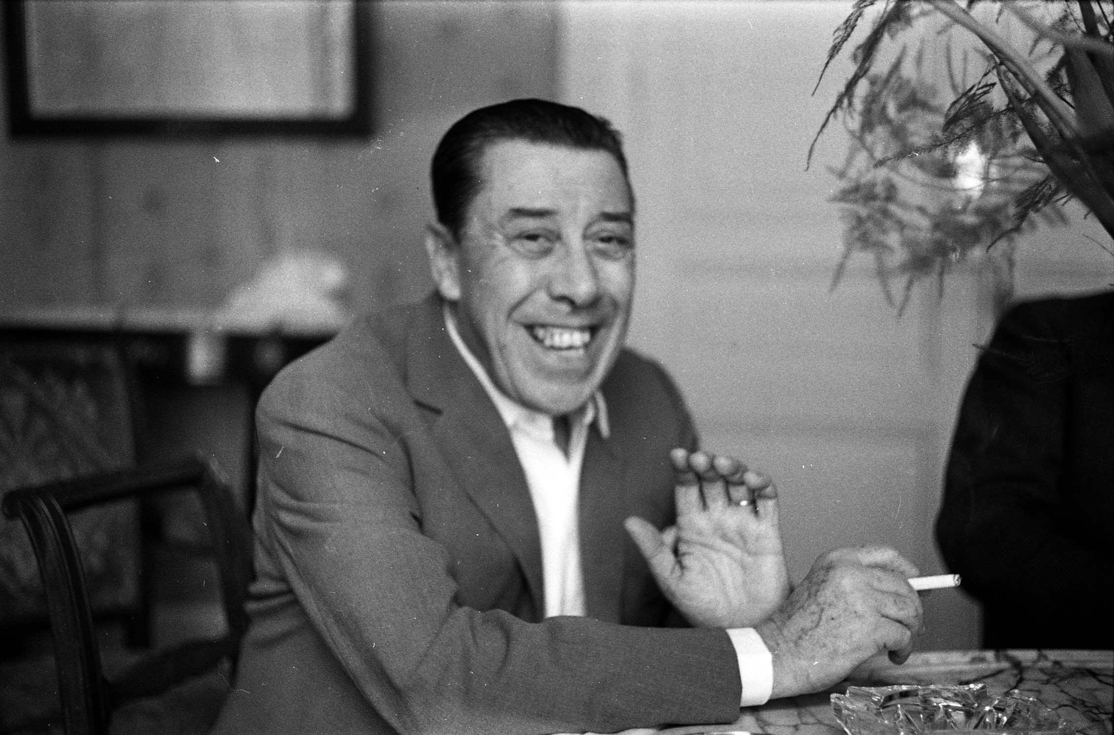 intérieur d'un appartement (ou hôtel) Toulousain. Le 14 mars 1970. Plan rapproché de face, de l'acteur Fernandel tenant une cigarette dans sa main gauche et souriant face au photographe, lors d'une interview à l'occasion de la représentation de la pièce de théâtre "Freddy" au théâtre du capitole. Observation: Représentation de la pièce de théâtre "Freddy" au théâtre du Capitole avec les acteurs Fernandel et Kellys.